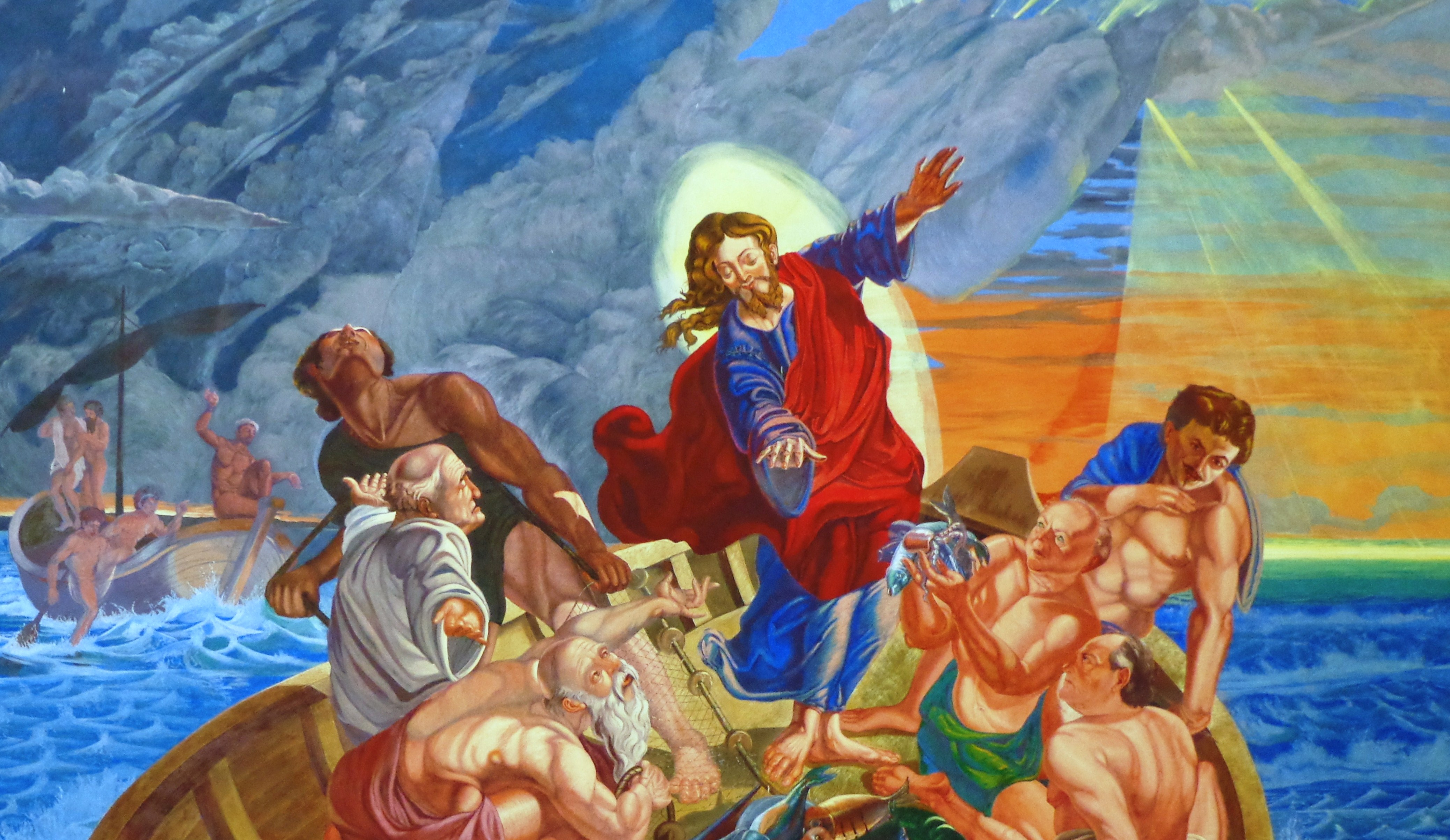 Basilica Minore di San Sebastiano Barcellona Pozzo di Gotto, Affresco lato Nord.